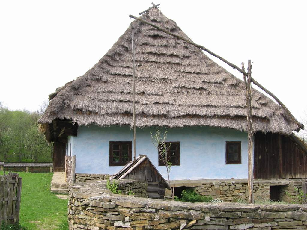 A farmer's house in Svidnik skansen.